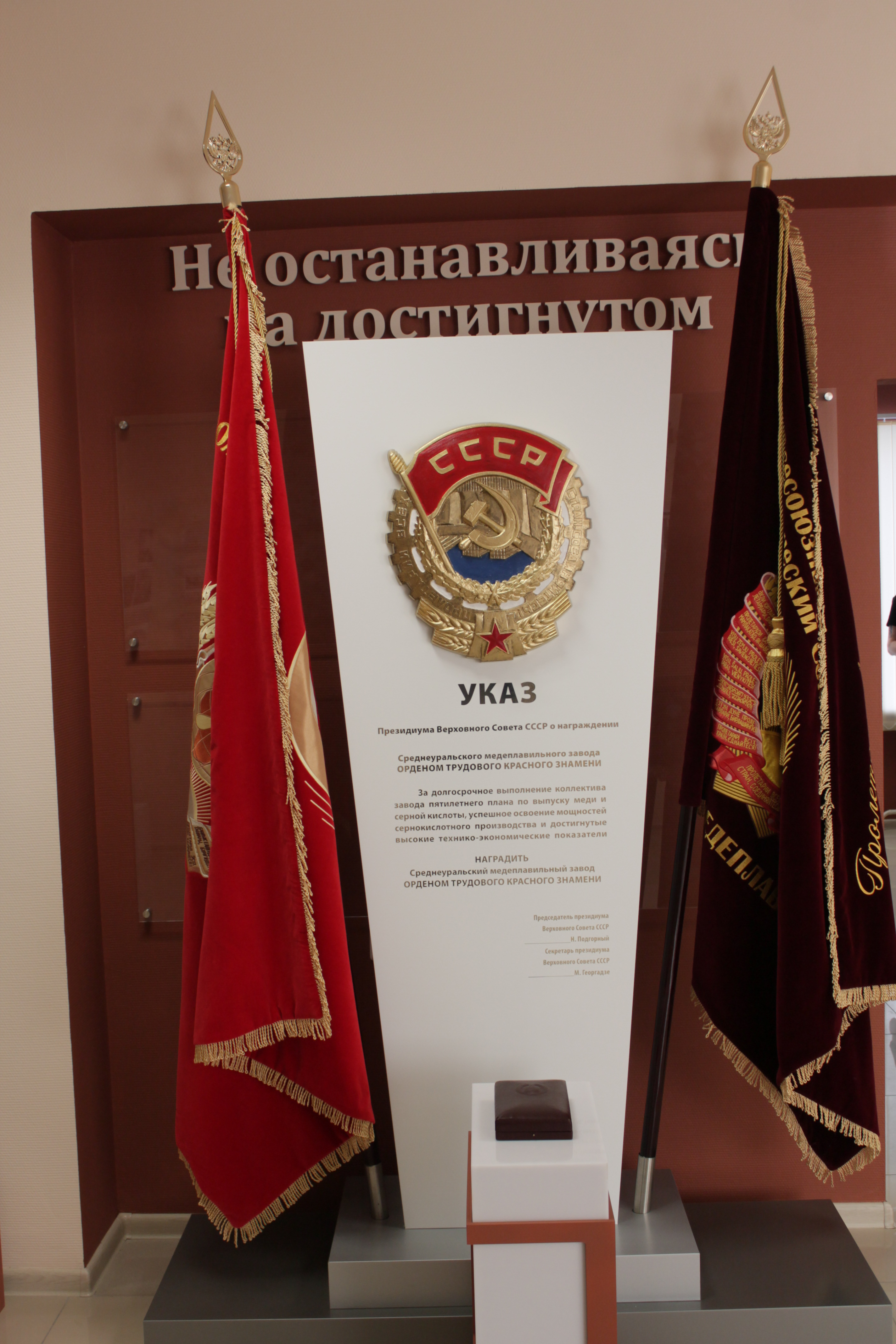 СУМЗ. Орден Трудового Красного Знамени и Красное Знамя на вечном хранении в Музеи Трудовой славы